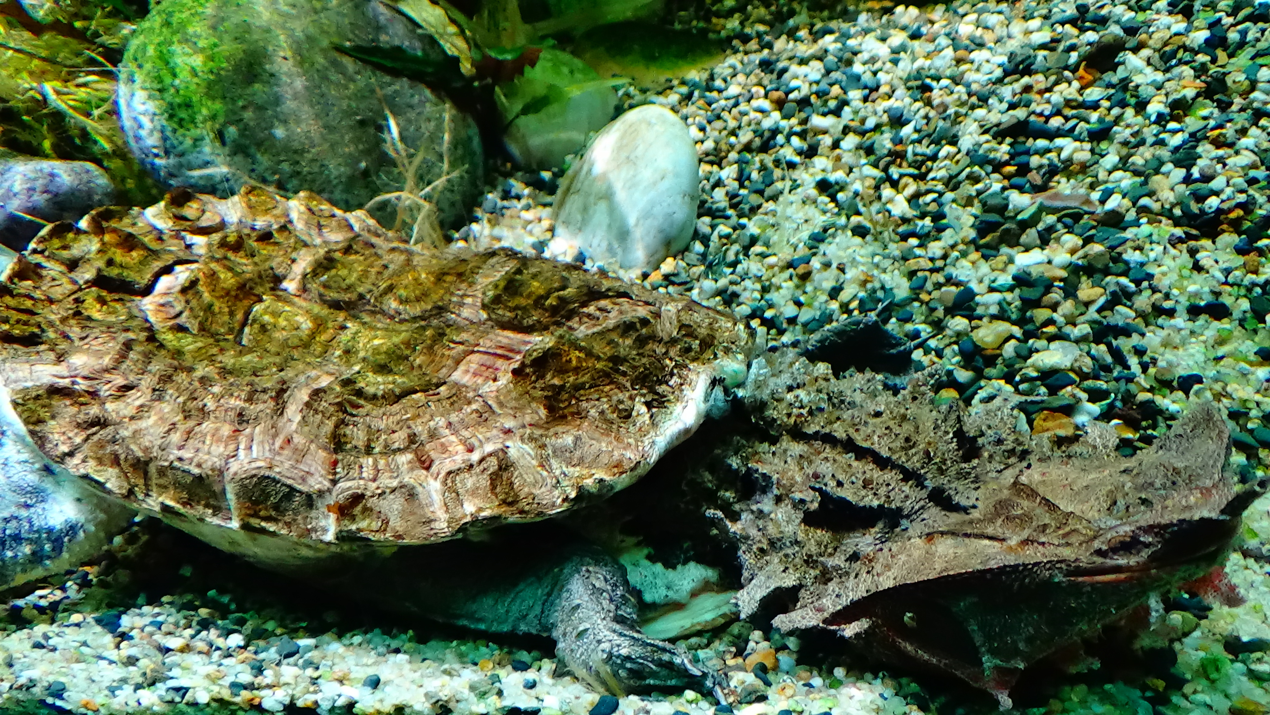 Chelus fimbriata - Matamata - Aquarium tropical du palais de la Porte dorée, Paris, Ile de France, France - 12/2014